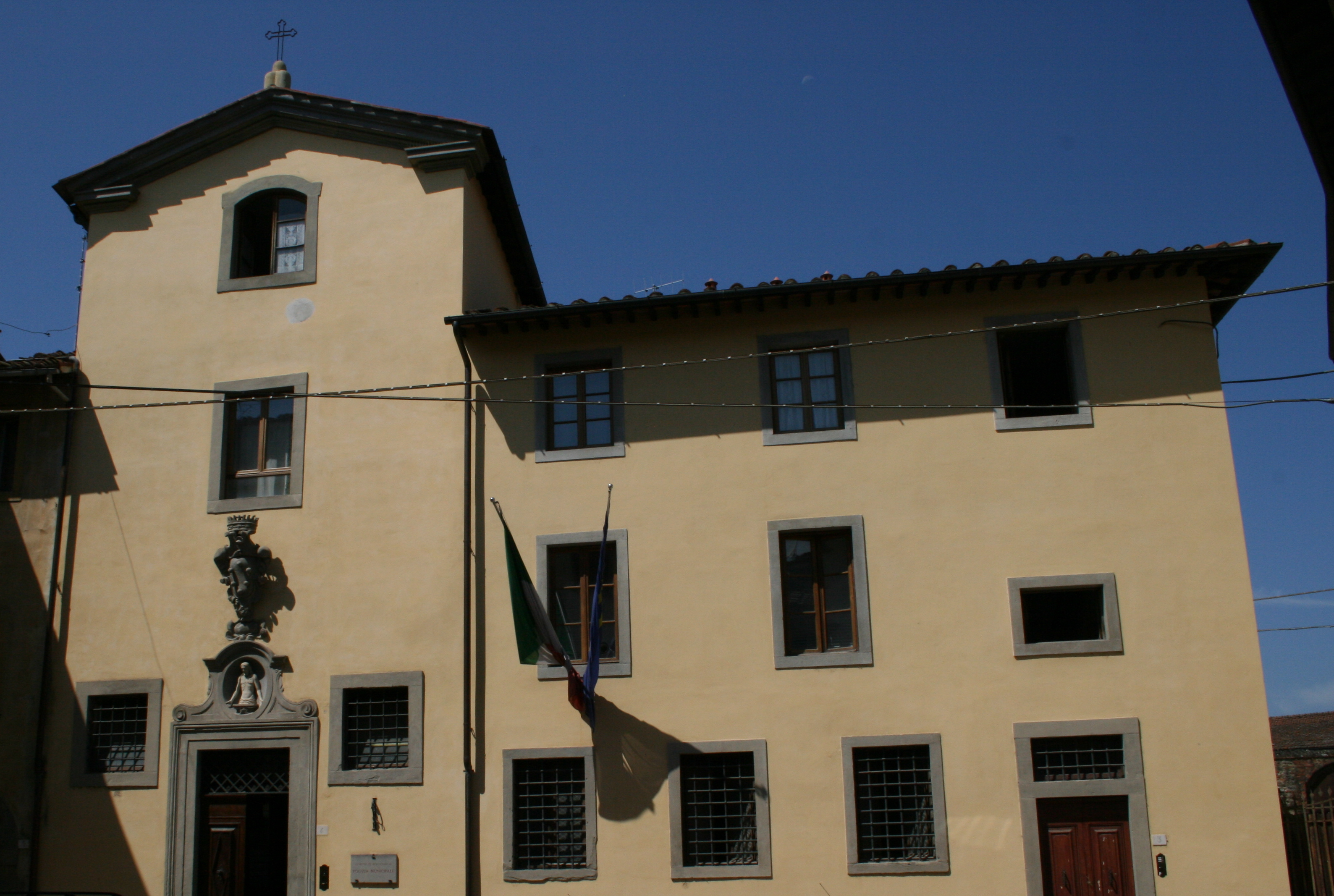 Monte di Pietà - Montevarchi